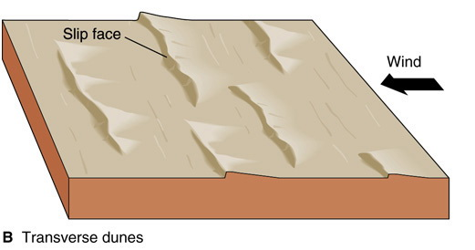 ภาพ 4 Tranverse